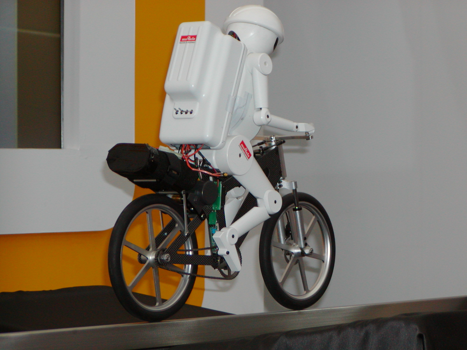 ムラタセイサク君 不倒停止中 CEATEC JAPEN 2005 2005年10月